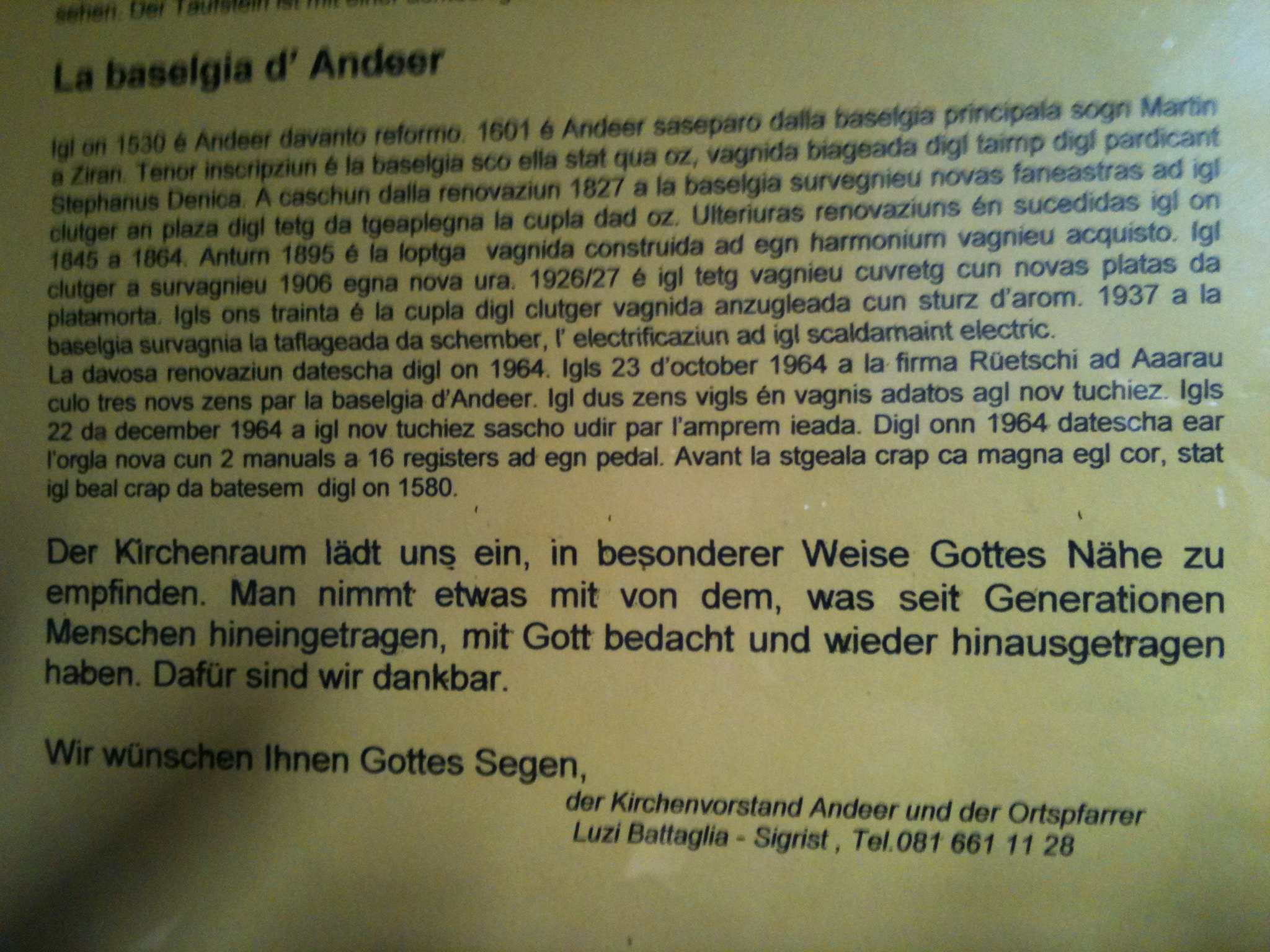 Sutsilvan - Beschreibung und Geschichte der reformierten Kirche Andeer, im Eingangsbereich der Kirche